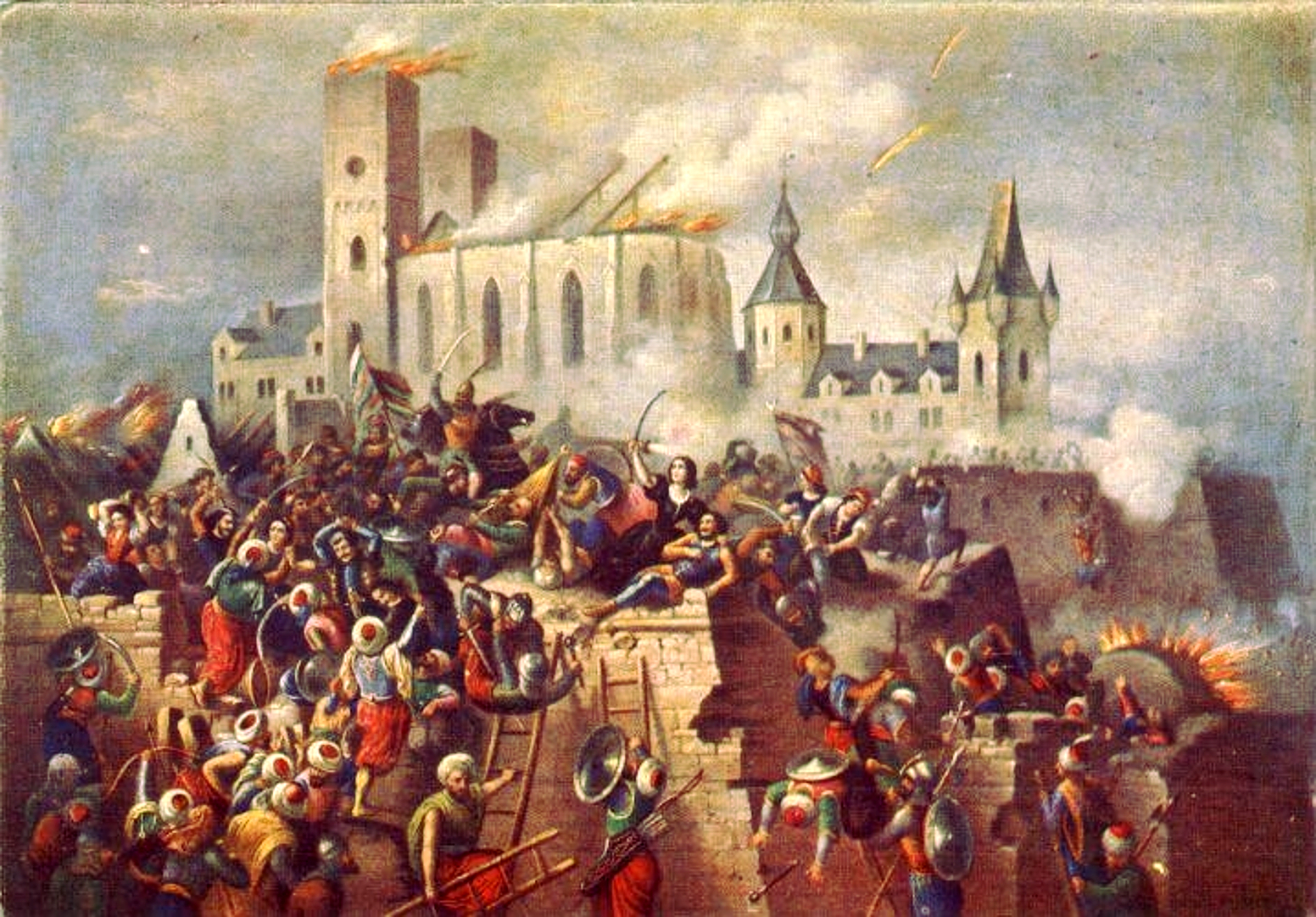 Eger vár ostroma, 1552-ben, Vízkelety Béla (1825–1864) festménye képeslapon. Vahot Imre tervei szerint Vízkelety Béla és Franz Kollarz által készített Eger ostromát ábrázoló litográfia. Egy sorozat eleme, amelynek első történeti kompozícióját Vahot Imre a Napkelet műlapjaként jelenteti meg 1857-ben. A Hunyadiház diadalünnepét ezután még évente egy históriai kompozíció követi: 1858-ban a Mátyás az igazságos, 1859-ben a Báthory István bevonulása végül 1860-ban az Eger várának hősi megvédése. A kőrajzokból Vahot csak utólag kerekít históriai ciklust, amikor 1860-ban “Magyar Történeti Képcsarnok” címen könyv alakban is kiadja a Vizkelety Béla ábrázolásaihoz kapcsolódó szövegeket.